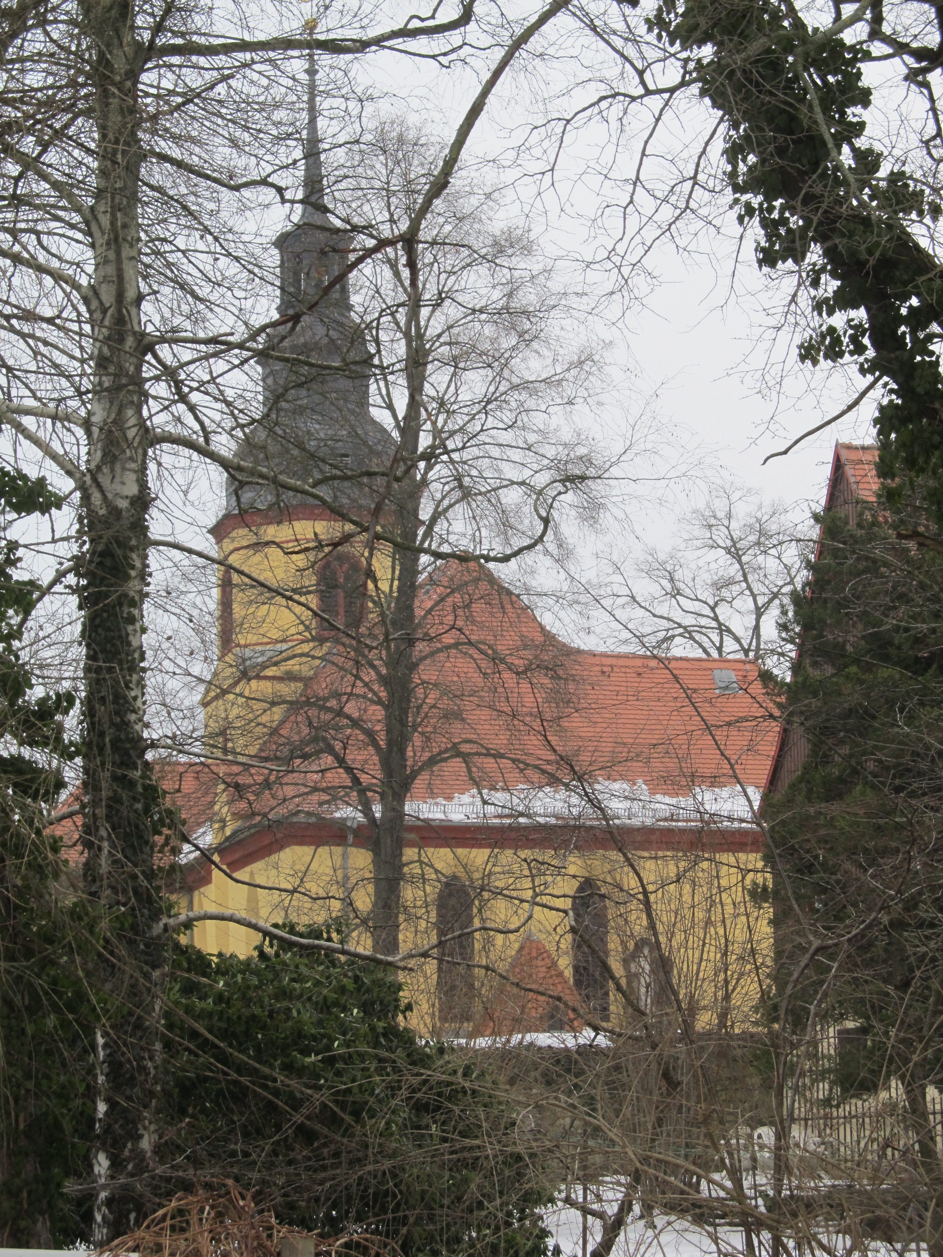 Lutherlinde in Lausa, Ortschaft Weixdorf, Dresden